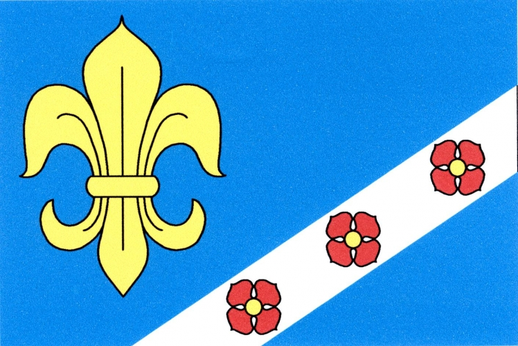 vlajka, Bezdědovice, okres Strakonice